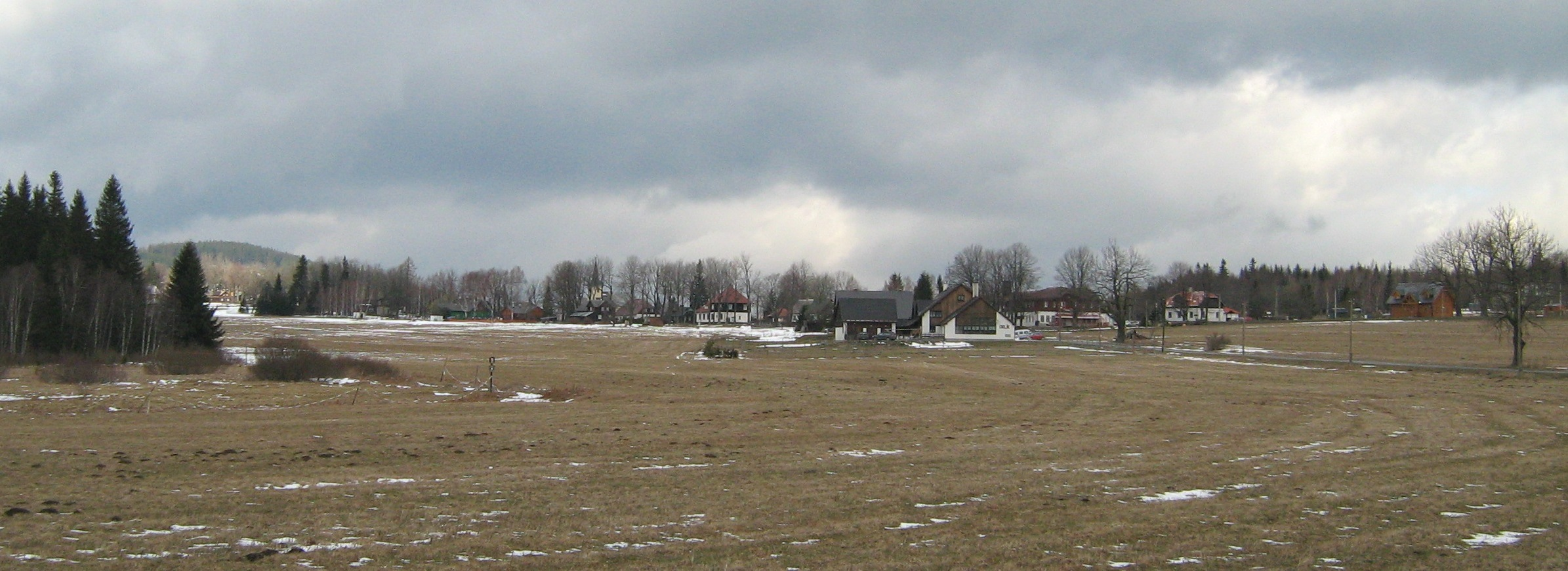 Rejvíz, CZ